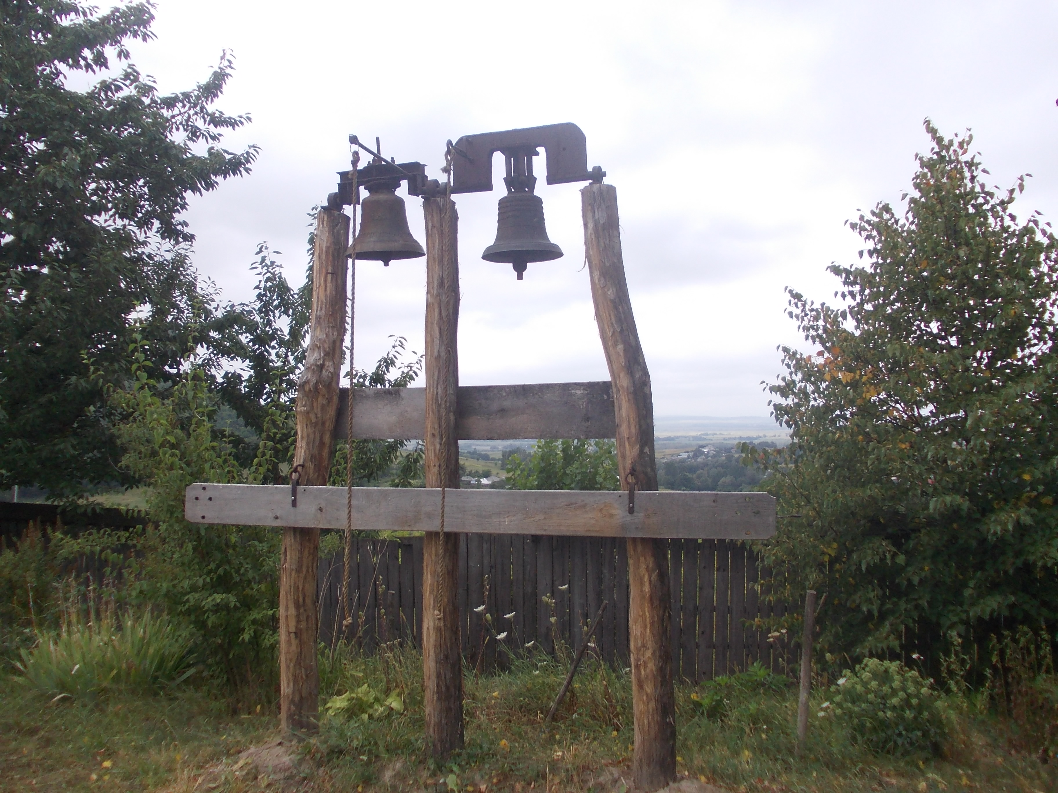 clopotniţa schitului Boureni